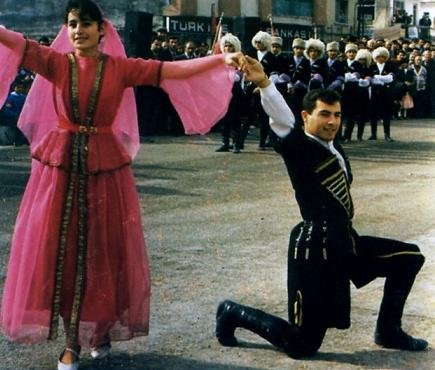 "Naz Eyleme" - Azerbaijani folk dance